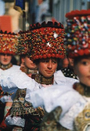 Lindhorster Brautzug beim Tag der Niedersachsen 1999 in Bückeburg